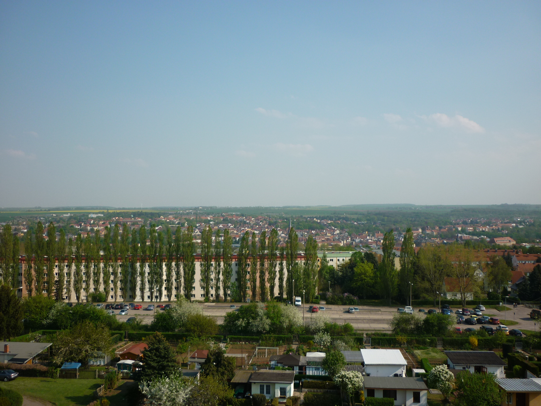 Bismarckturm Apolda - Blick in Richtung Süden